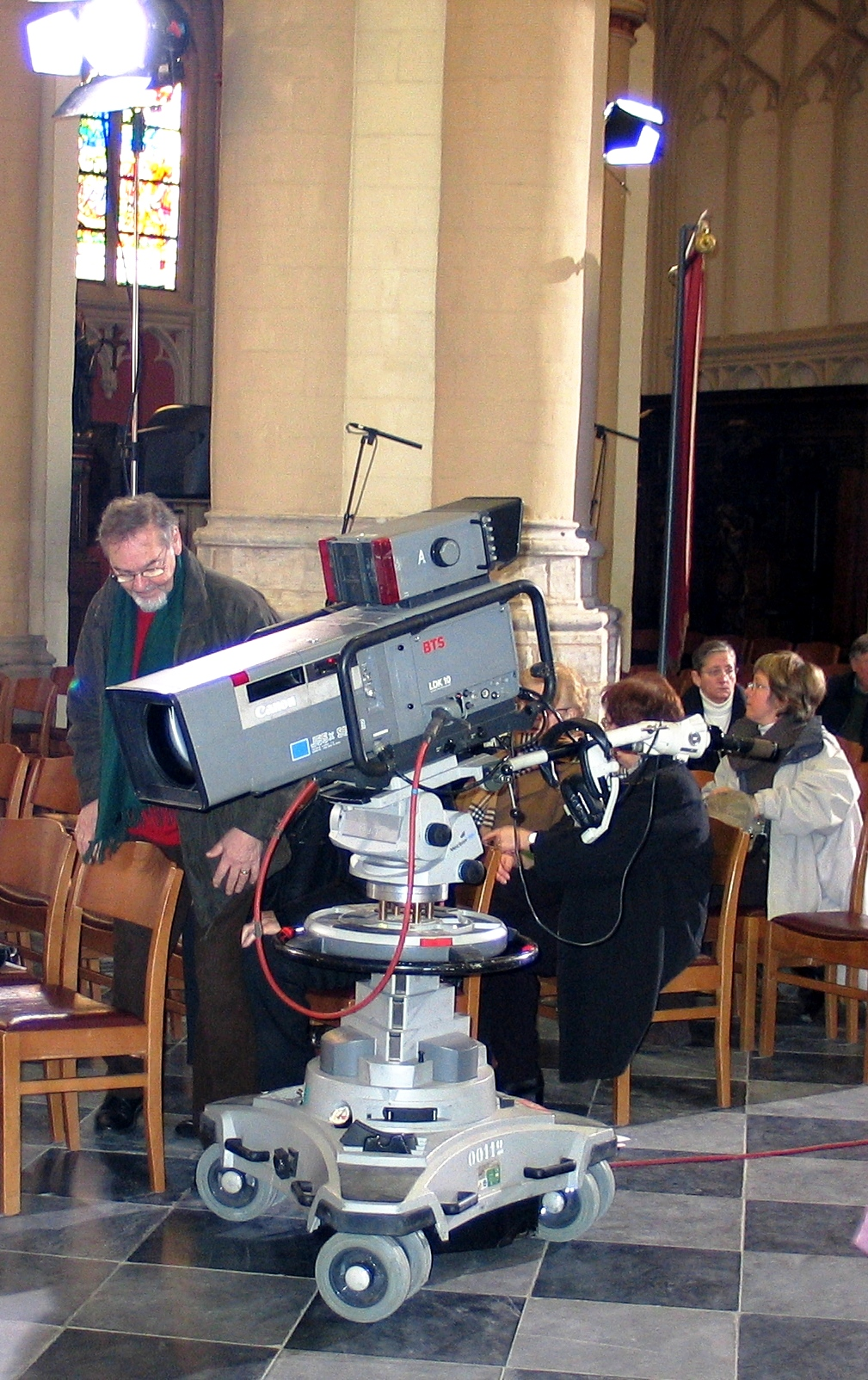 TV-camera - eigen foto